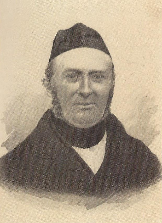 Carl Friedrich Hermann Klenze (1795–1878), Justizrat, Superintendent, Syndikus und Reformator des Schleswig-Holsteinischen Schulwesens